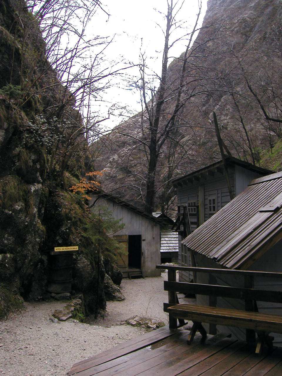 Partisans_Camp_of_Franja_in_Slovenia